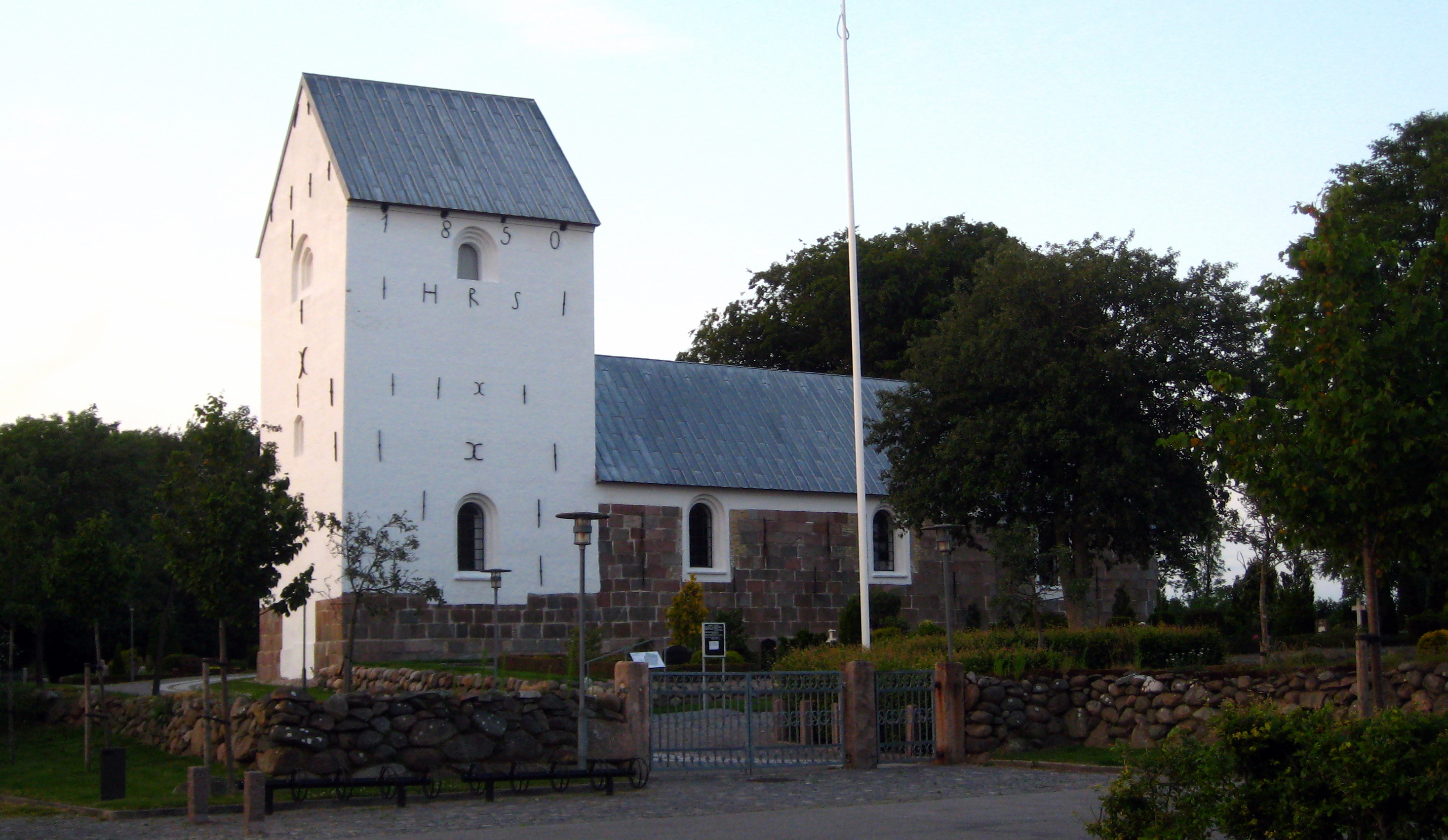 Aaby Kirke (Jammerbugt Kommune)